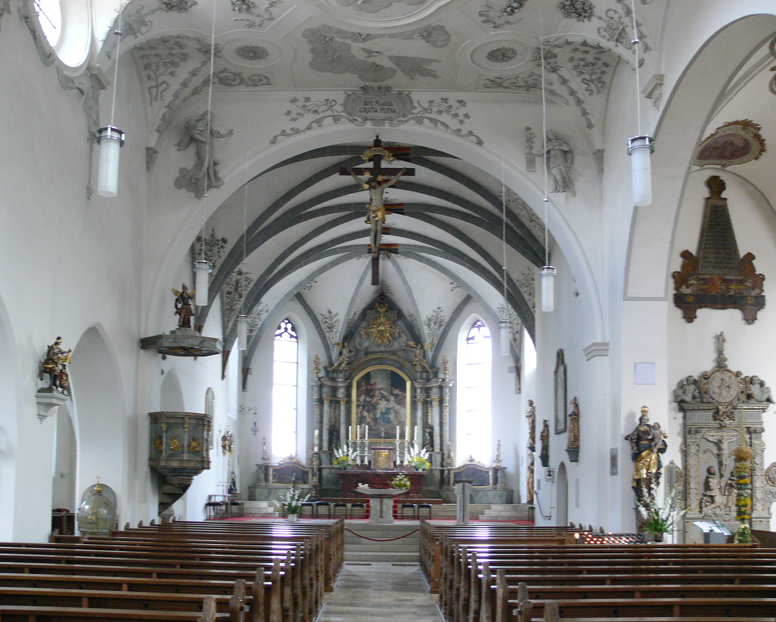 Pfarrkirche St. Martin, Aulendorf, Landkreis Ravensburg Blick zum Chor